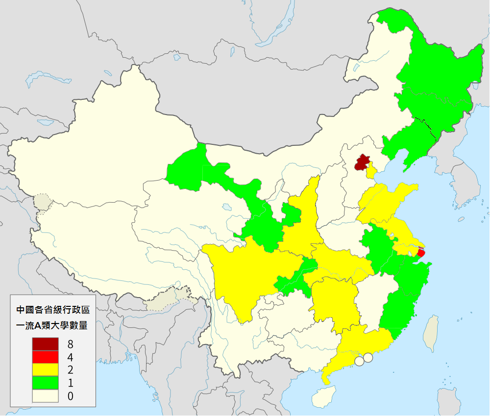 各省A類大學數量